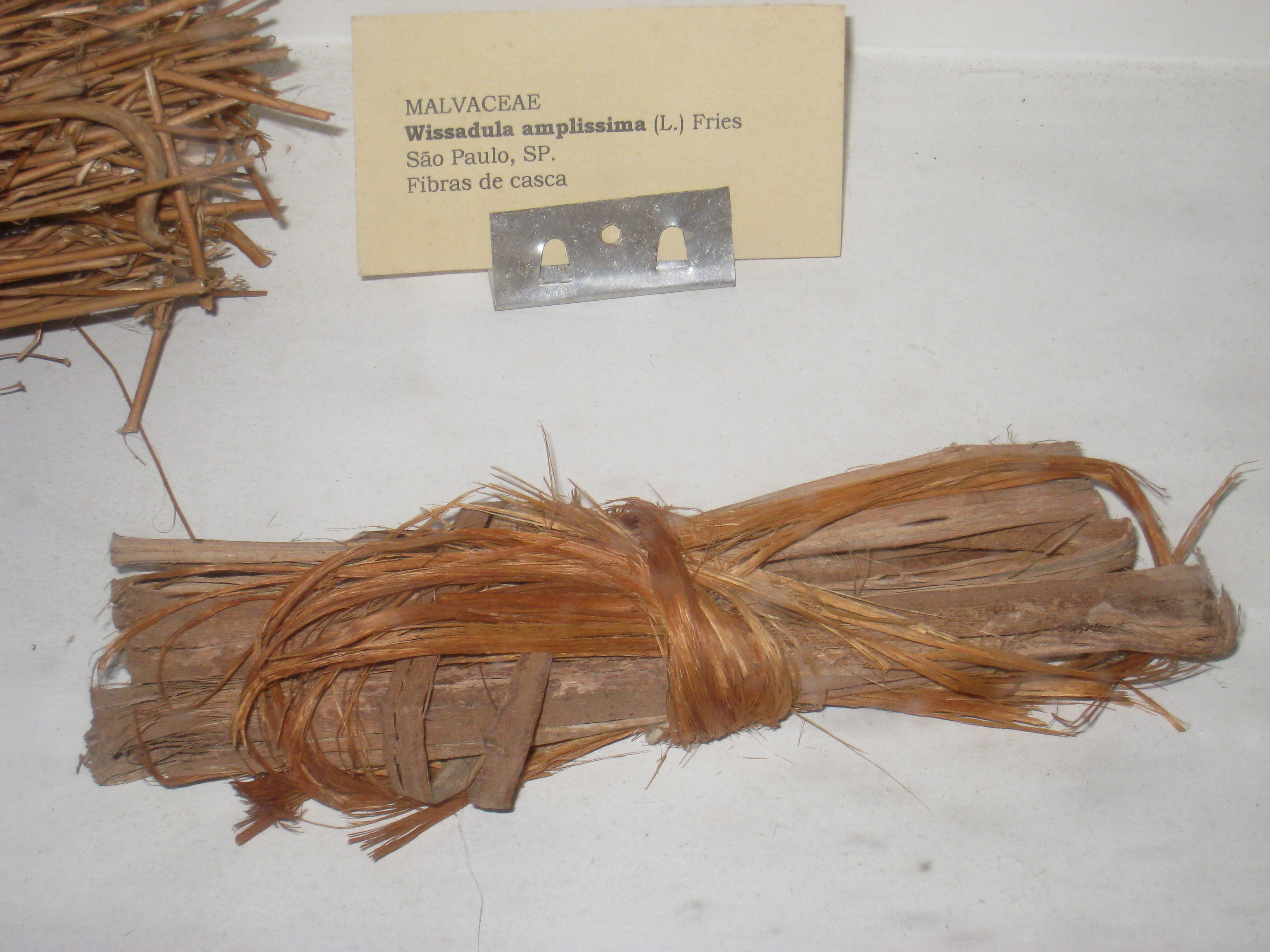 Wissadula amplissima specimen in the Museu Botânico Dr. João Barbosa Rodrigues, Jardim Botânico de São Paulo, São Paulo City, SP, Brazil.